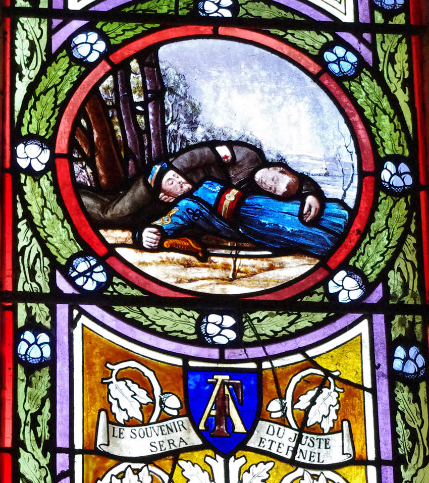 Vitrail du XIXe siècle dans l'église Saint-Germain d'Yvré-l'Évêque (Sarthe), chapelle des Zouaves